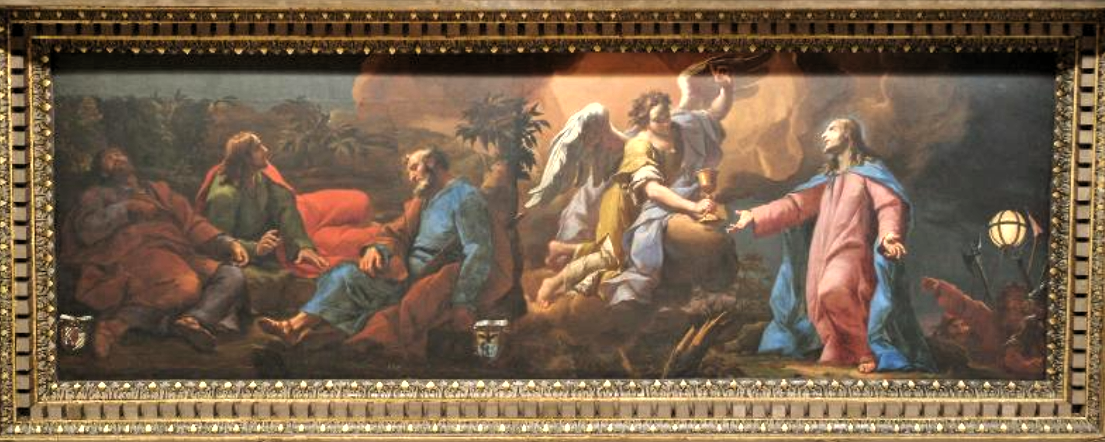 Antonio Arrigoni, sec, XVII ,Gesù Cristo nell'orto di Gethsemani, soffitto del duomo di Thiene (Vi); olio su tela.